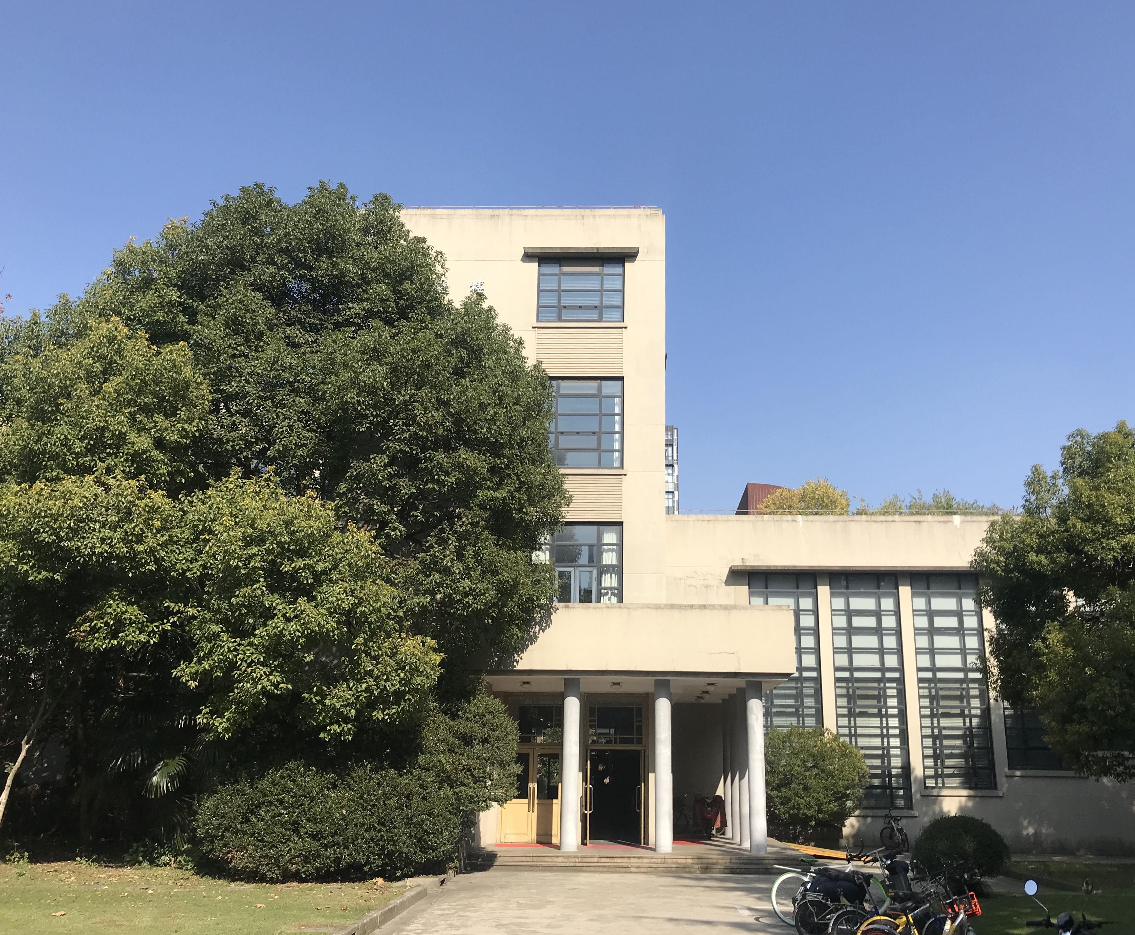 文远楼正门，位于同济大学四平路校区北部